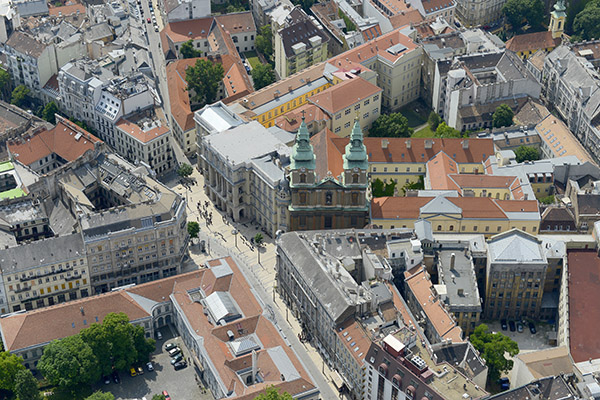 Elte jogi kar és száz másik épület a légi felvételen pl ELTE Apáczai Csere János Gyakorlógimnázium és Kollégium (Papnövelde u. 4), Pázmány Péter Katolikus Egyetem Hittudományi Kar (Veres Pálné u. 24), Petőfi Irodalmi Múzeum (Károlyi utca 16), Egyetemi Templom (Papnövelde u. 5-7), Szent György nagyvértanú szerb ortodox templom (Szerb utca 4.)Egyetem Square, Váci street , Szerb street, Papnövelde street Eötvös Loránd Faculty of Law + hundred buildings